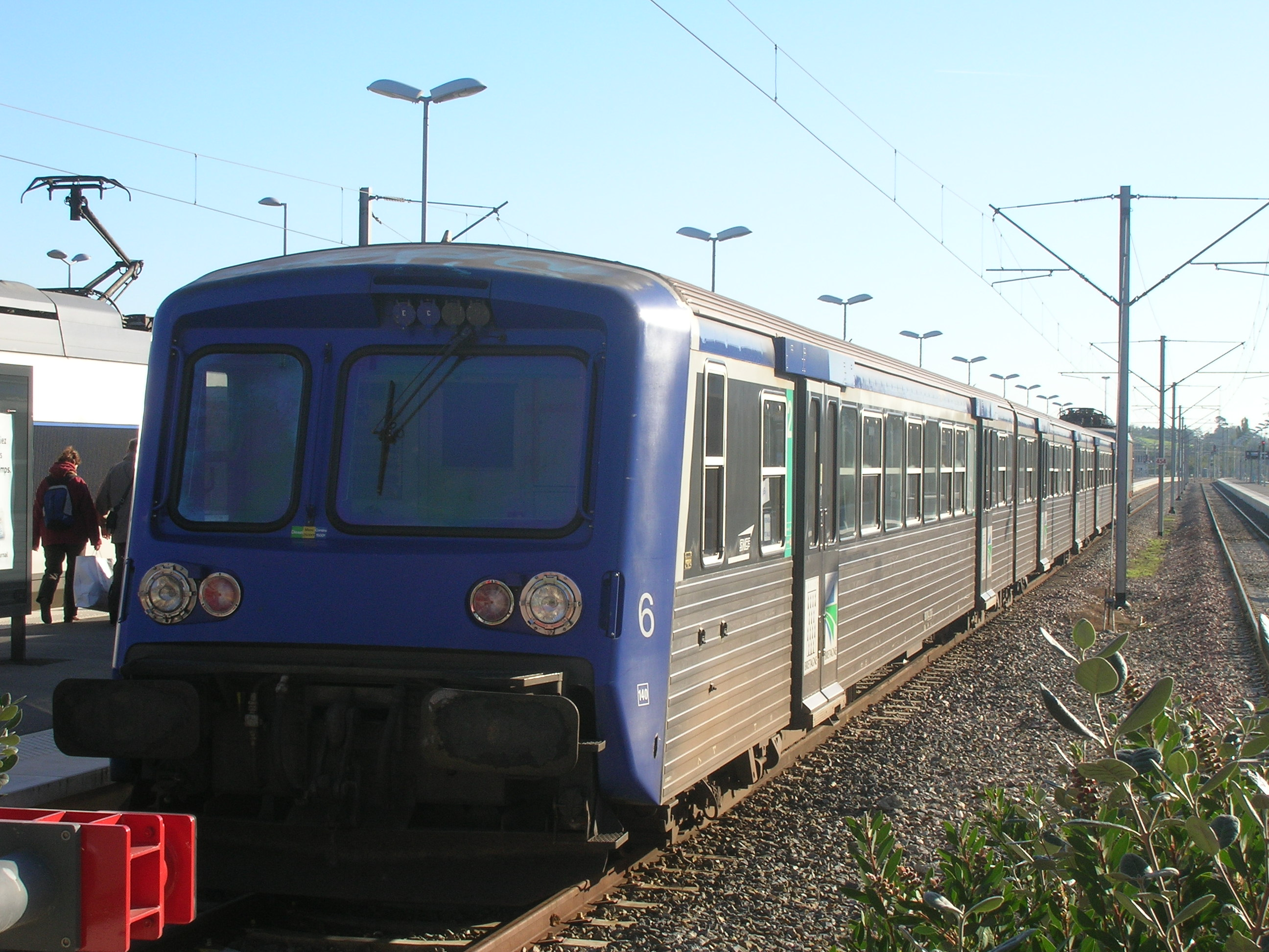 Rame réversible régionale du TER Bretagne, Saint-Malo, France